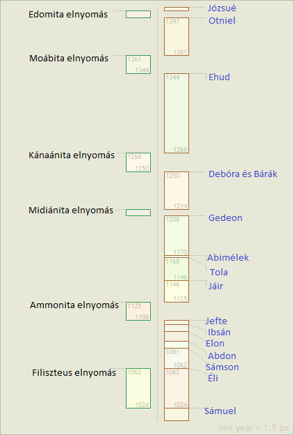 Az ókori Izráel bíráinak kronológiája